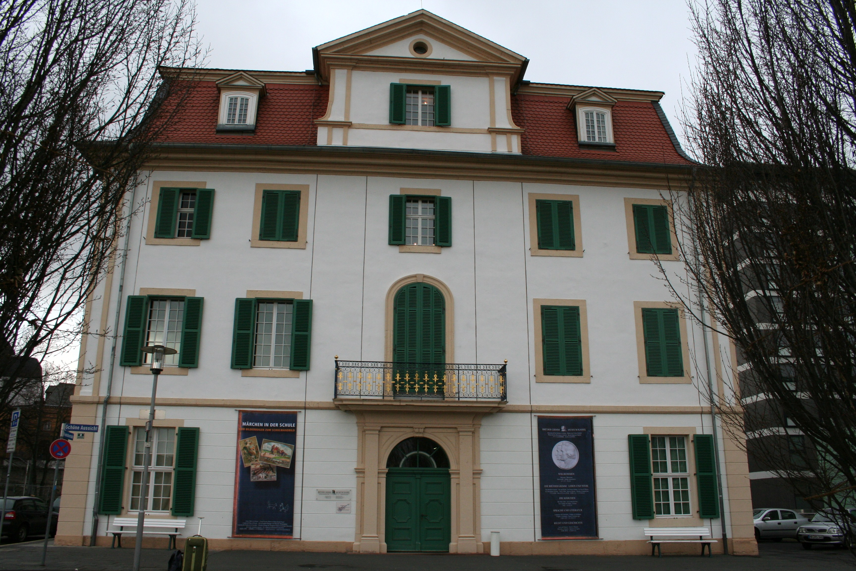 Palais Bellevue in Kassel, bis 2009 Sitz des Brüder-Grimm-Museums